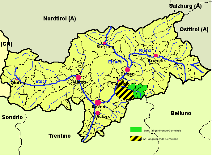 Südtirolkarte mit markiertem Grödnertal und angrenzenden Gemeinden